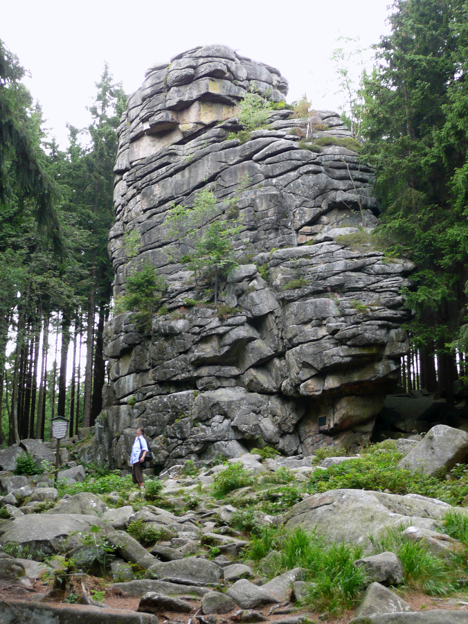 Feuersteinklippe Schierke